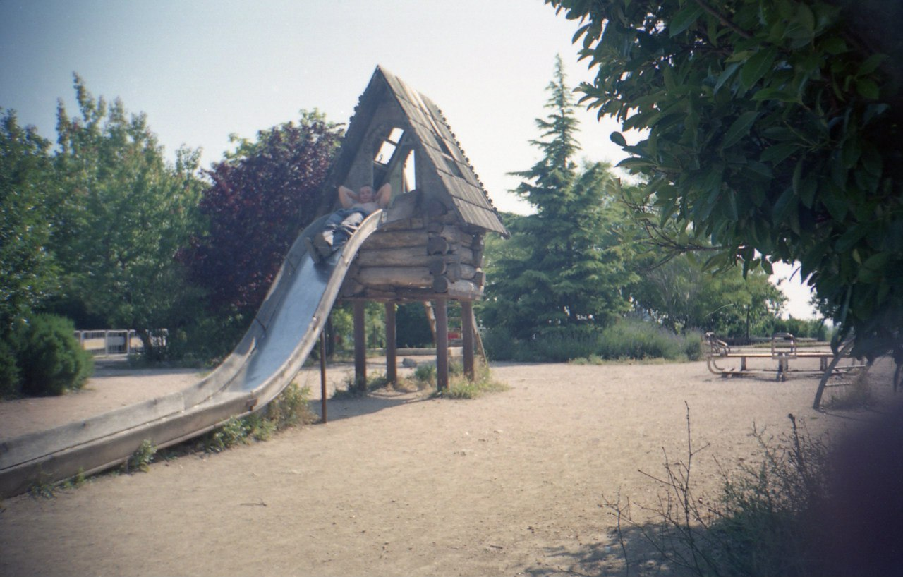 Аттракцион "Избушка" в Динопарке. Украден в начале 2000-х